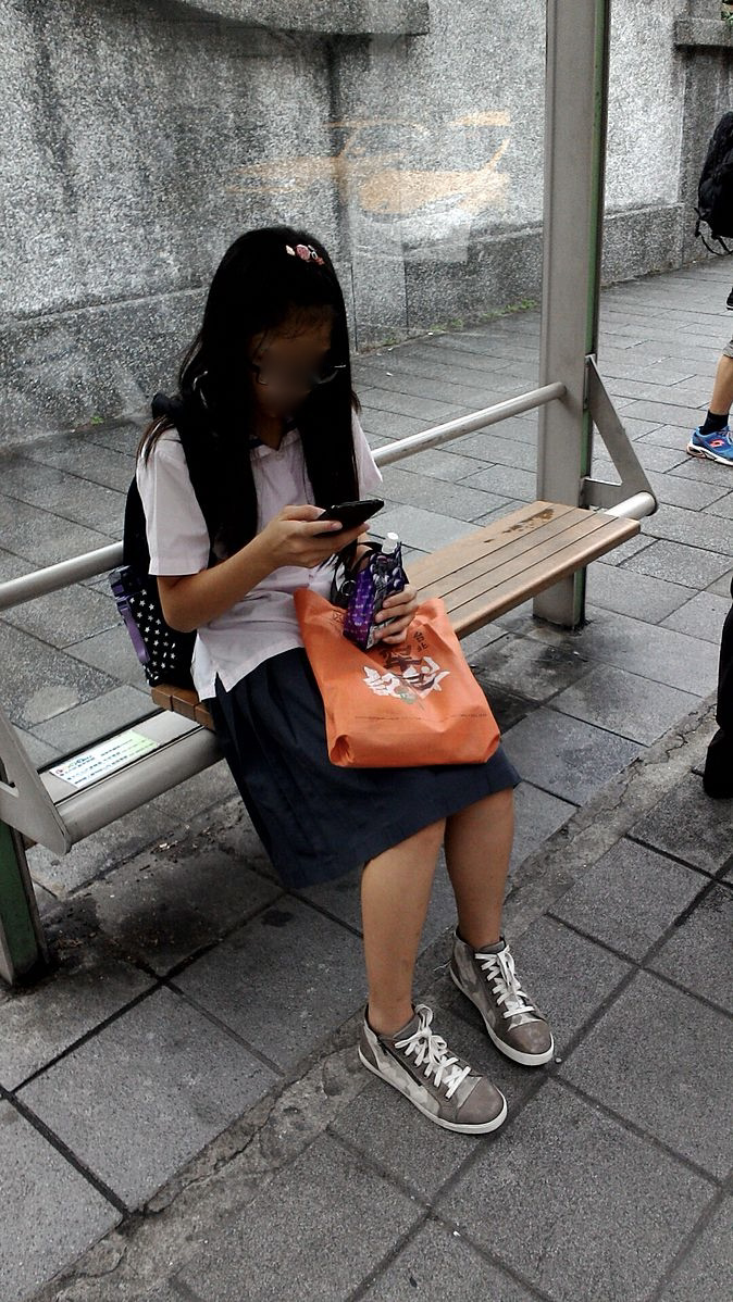 和平高中國中部女生夏季制服